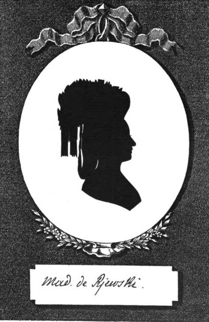 Глафира Ивановна Ржевская, ур.Алымова (1758-1826)